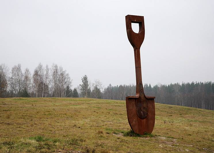 Skulptur av Gunnar Carl Nilsson i Abine Noijs park, Hälleforsnäs